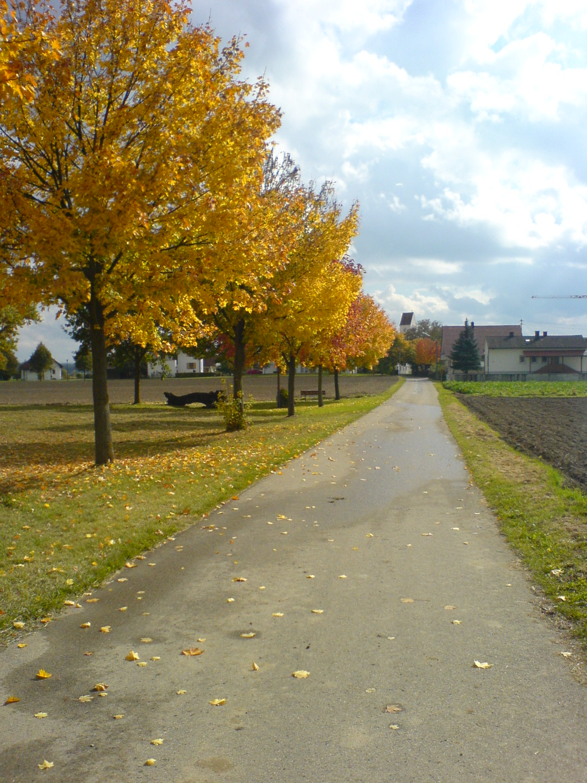 Mitterwöhr